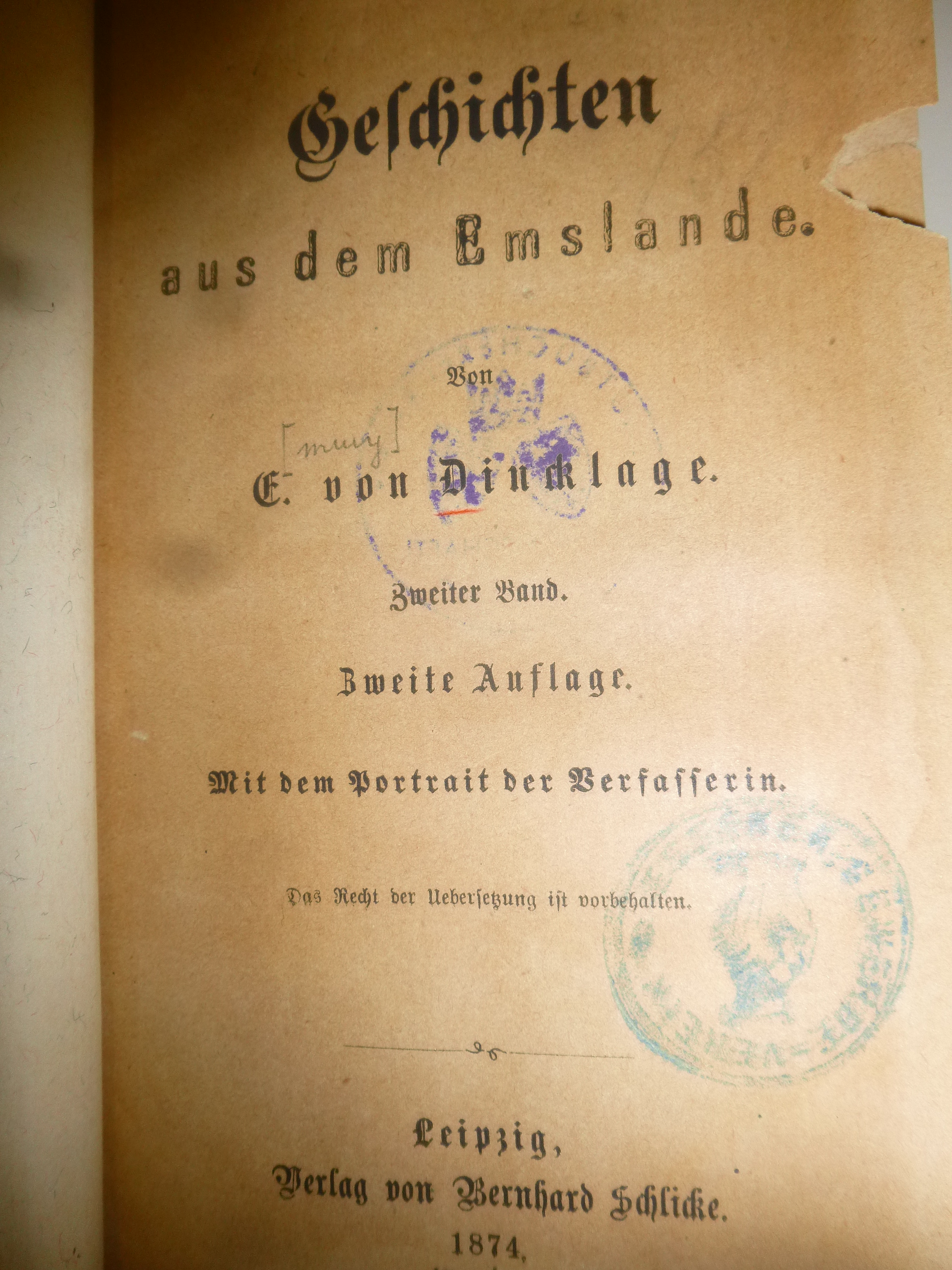 Emmy von Dincklage Geschichten aus dem Emslande 1872 Titel